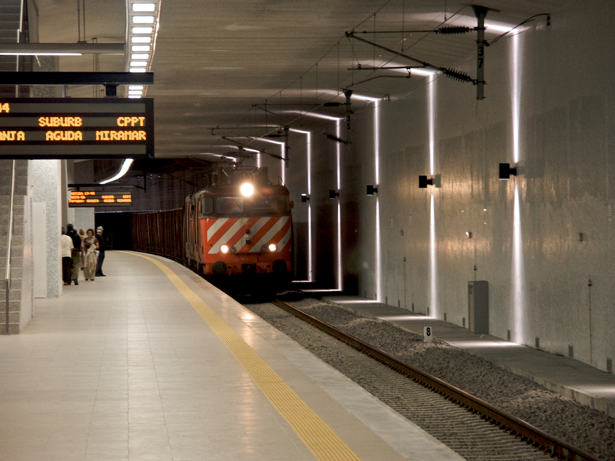 Tipo: Comboio Eixo 51335 [Entroncamento - Gaia] Local: Apeadeiro de Espinho [Linha do Norte, PK 316] Data e hora: 16 de Junho de 2008 [17h31] Material: Locomotivas 2552 e 25xx + xx vagões (CP Ealos e CP Tdgs)